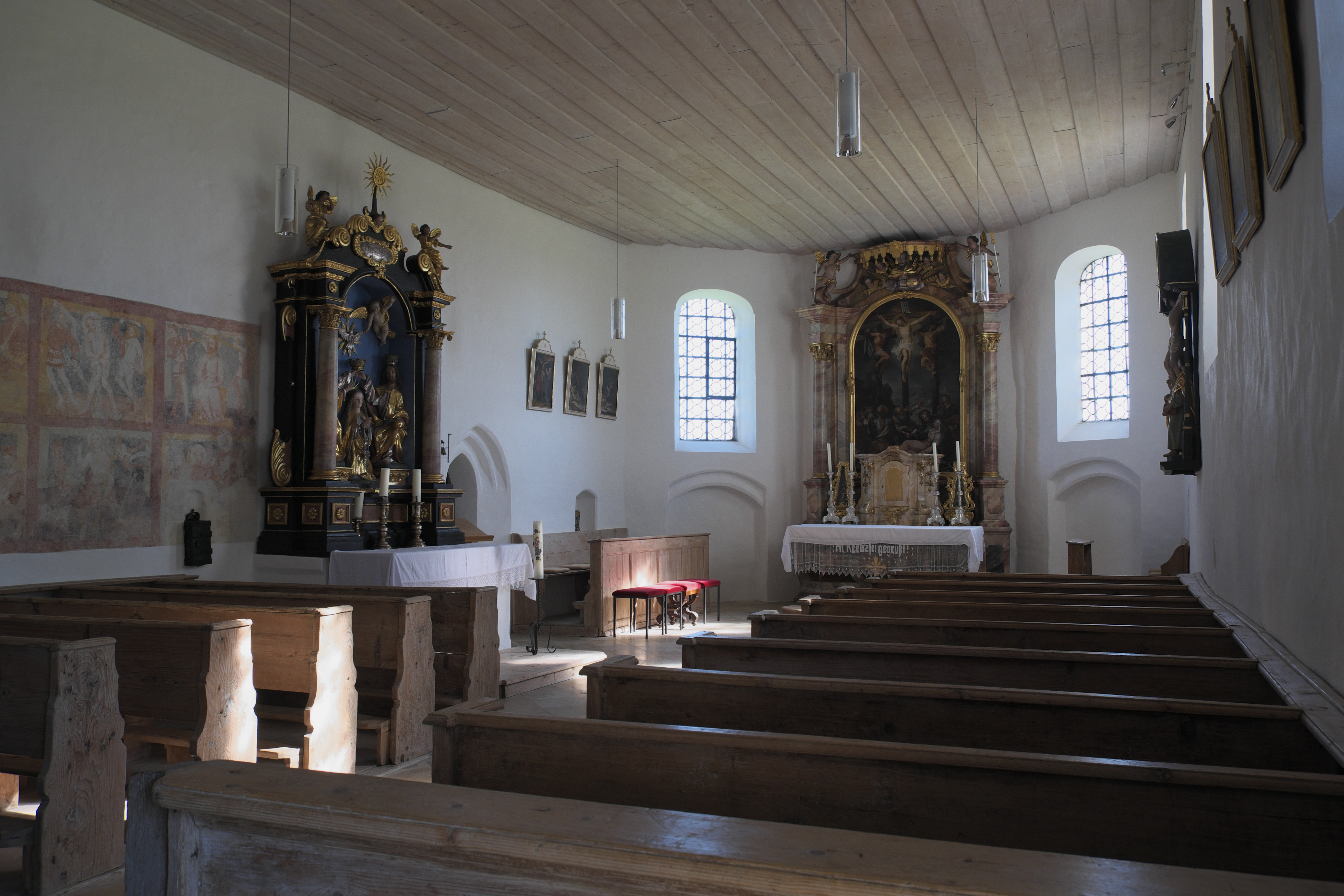 Katholische Filialkirche St. Maria (Maria Himmelfahrt) in Bergkirchen (Jesenwang) im Landkreis Fürstenfeldbruck (Bayern/Deutschland), Innenraum